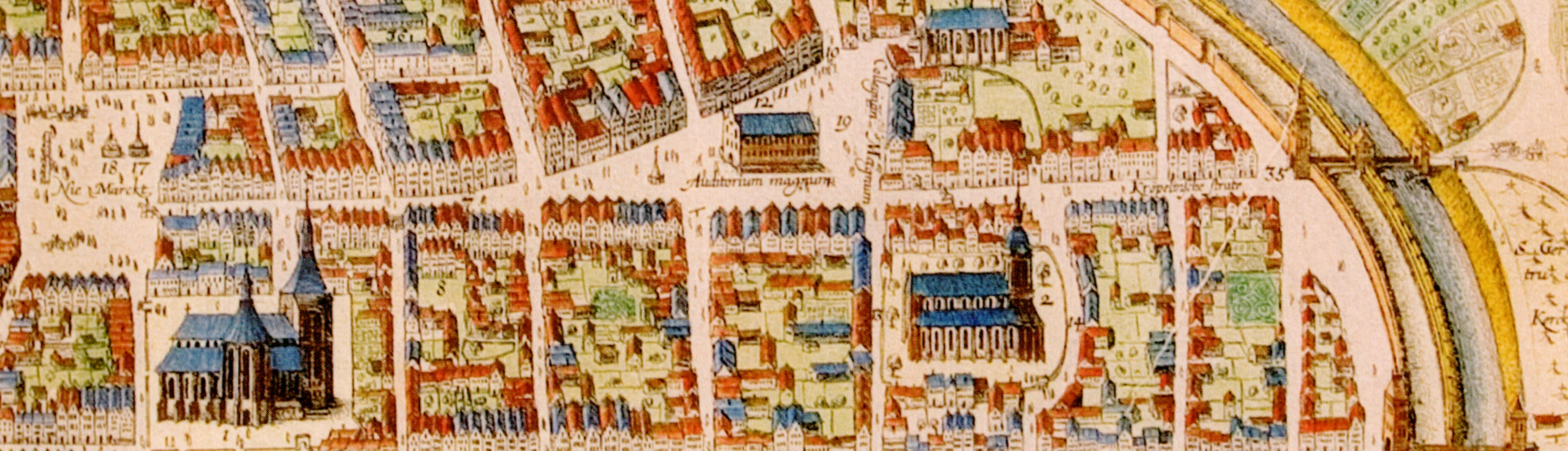 Wenzel Hollar: Plan von Rostock; Detail: Kröpeliner Straße